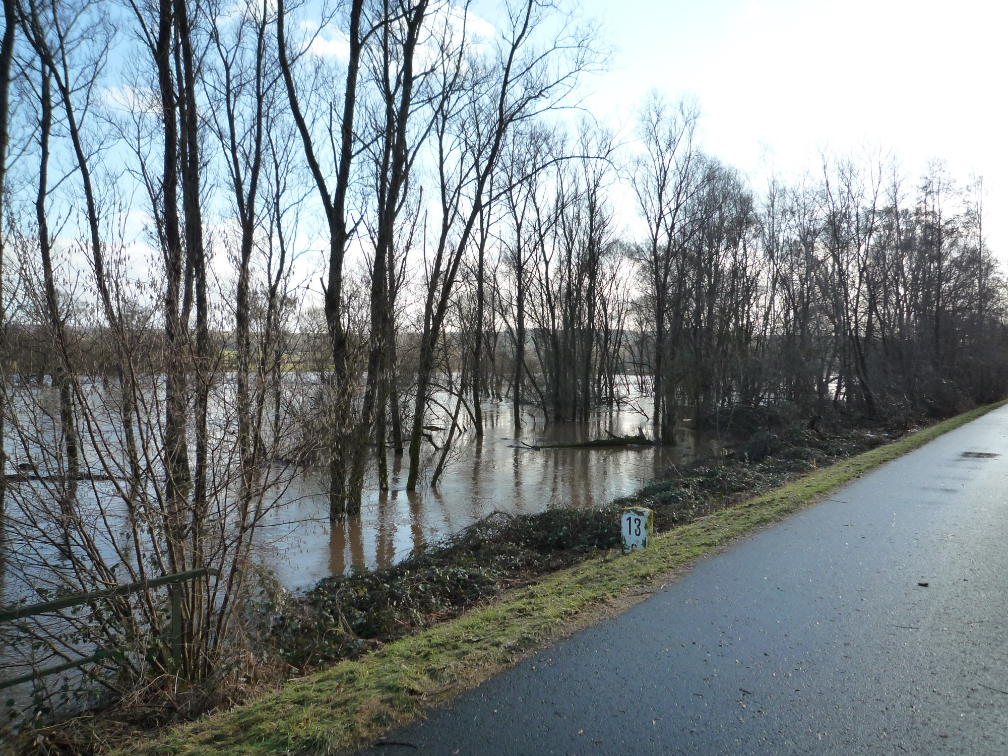 Überschwemmte Bliesaue bei Blieskastel nach Schneeschmelze im Januar 2011